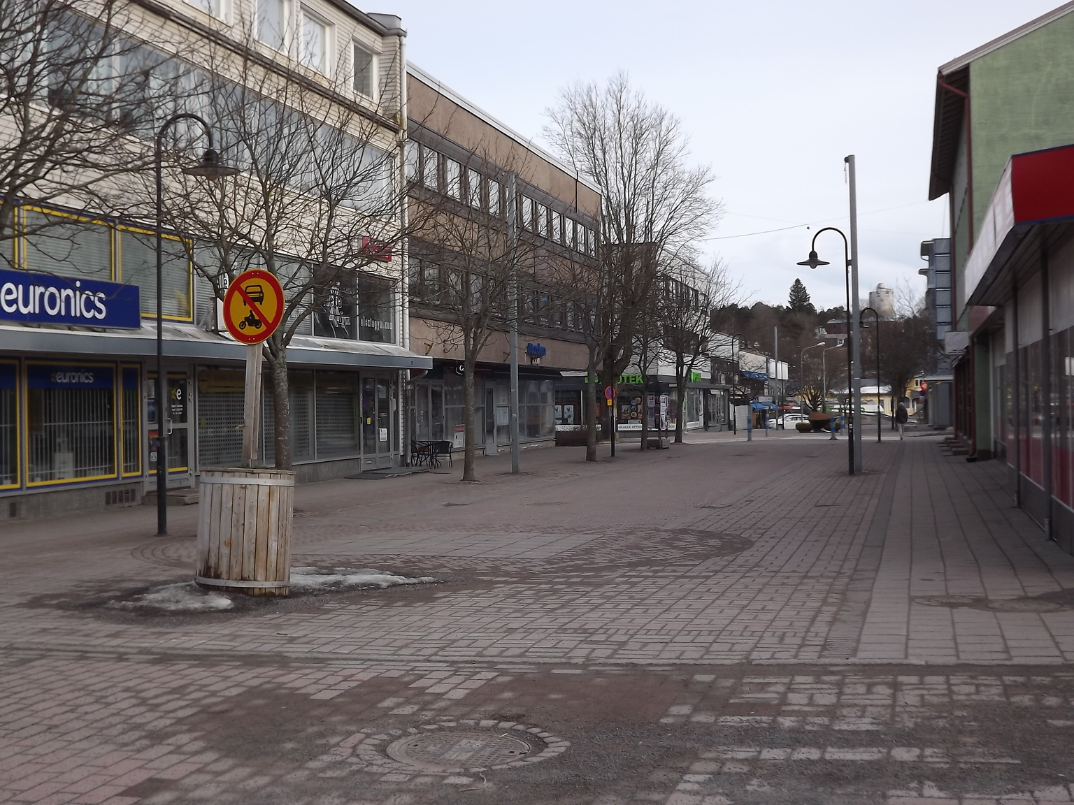 Köpmansgatan i Karis söderut en lördagskväll tidigt i april.